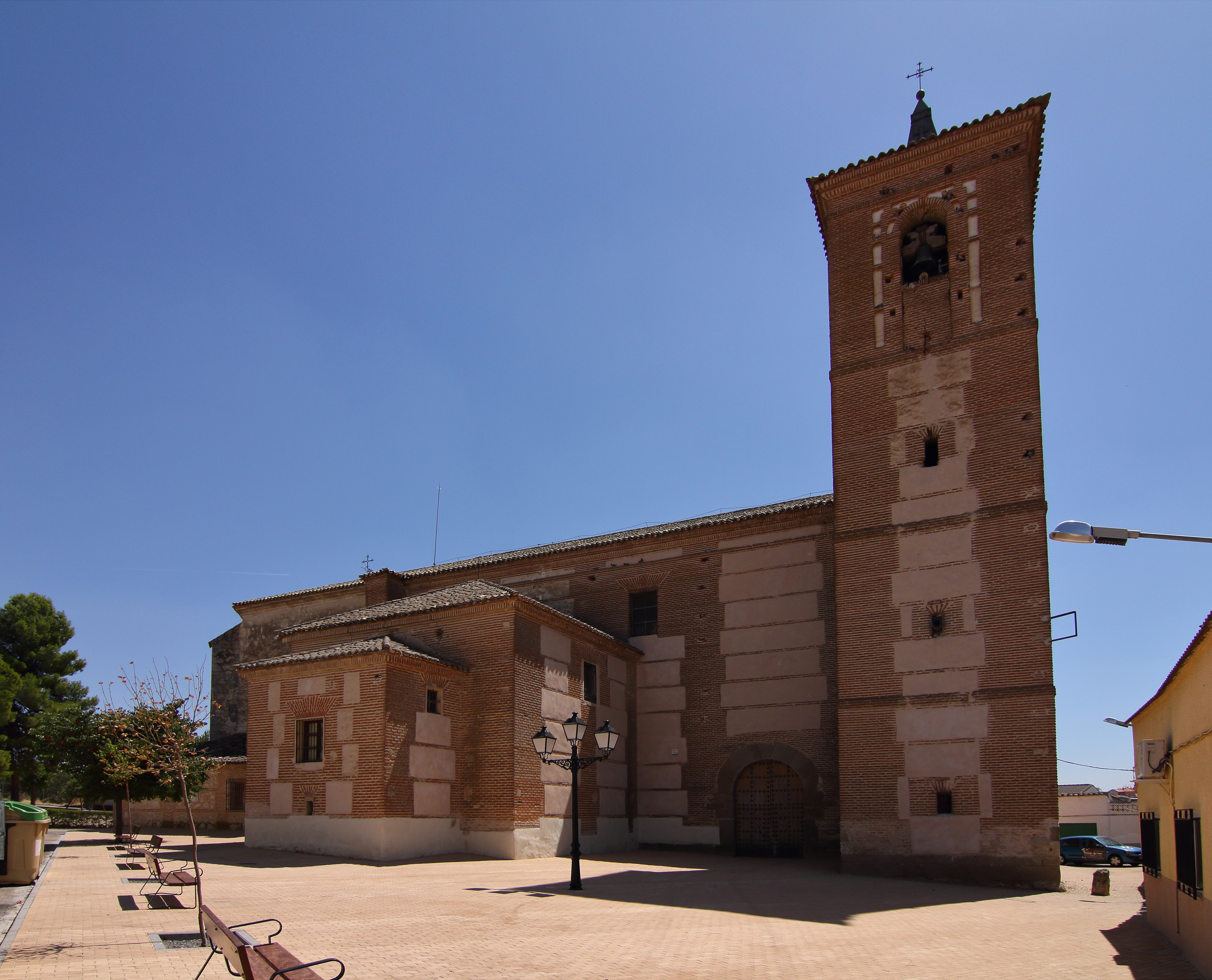 Santo Domingo-Caudilla, Iglesia Santo Domingo de Silos, fachada norte